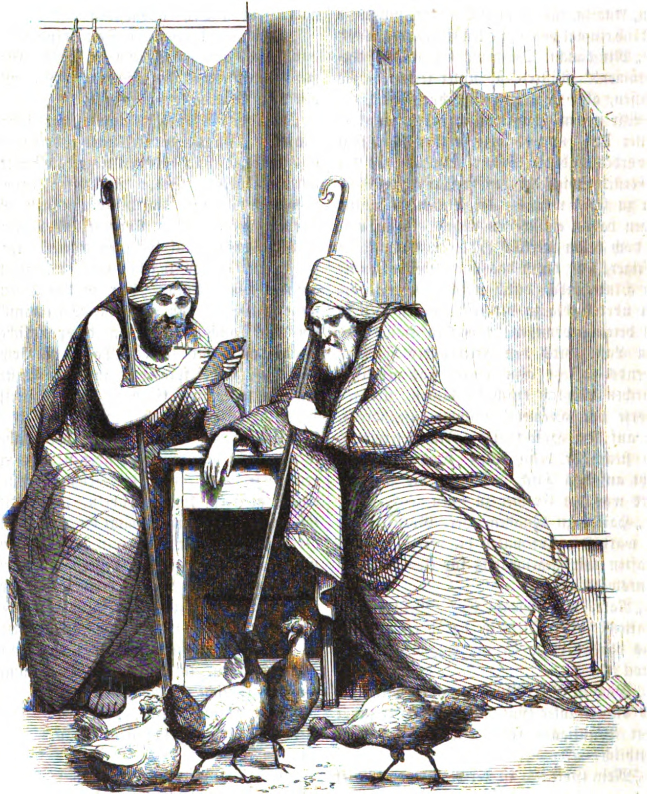 Römische Auguren in einer Darstellung des 19. Jahrhunderts.